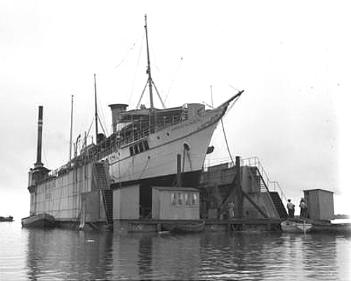 Kamerun, Duala, Schiff "Herzogin Elisabeth" Duala.- "Herzogin Elisabeth" im Dock [Kamerun, Duala.- Schiff "Herzogin Elisabeth" im Dock (Ausschnitt aus Stereobild)]